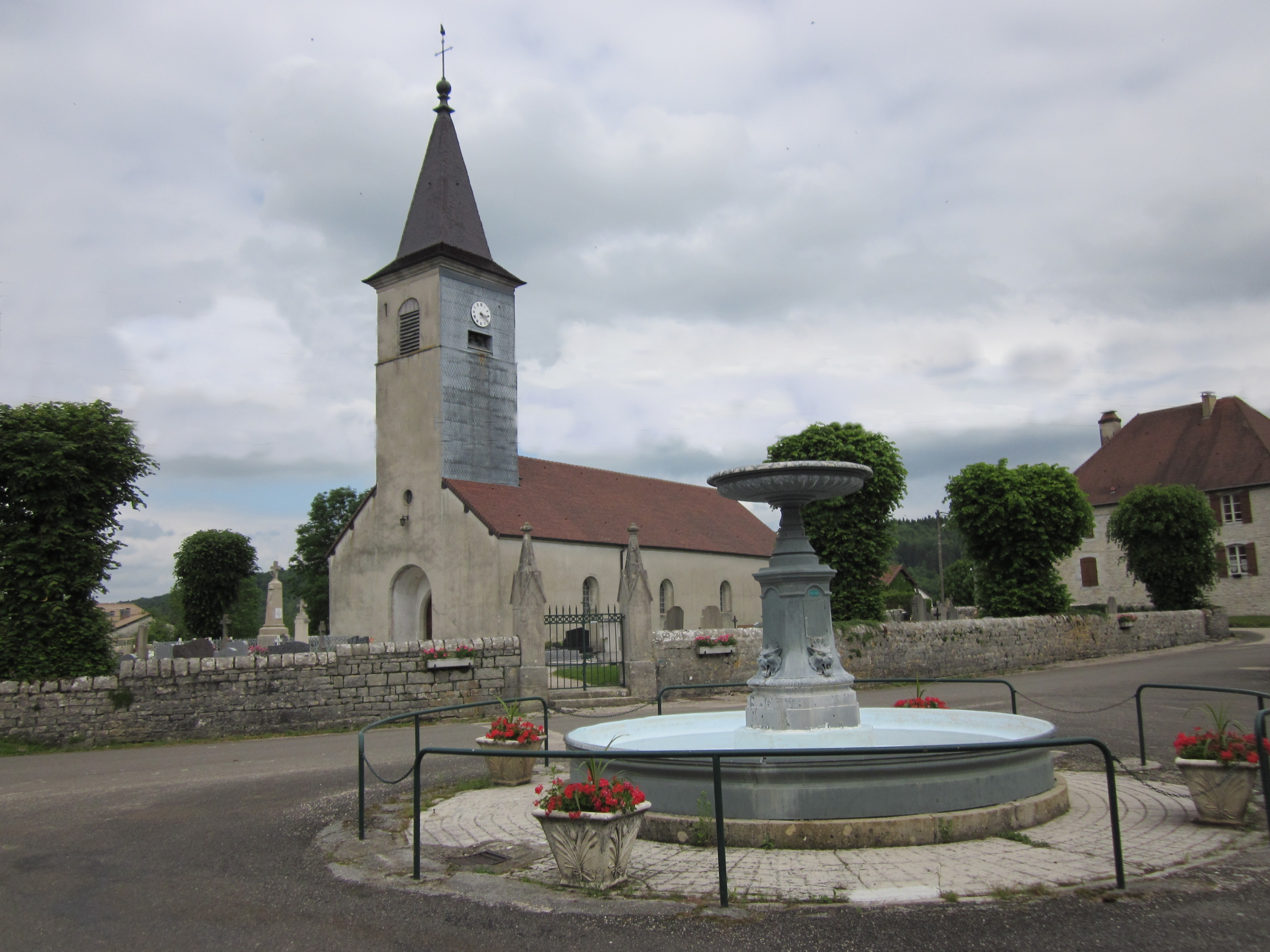 Marigny (département du Jura - France) - église et fontaine